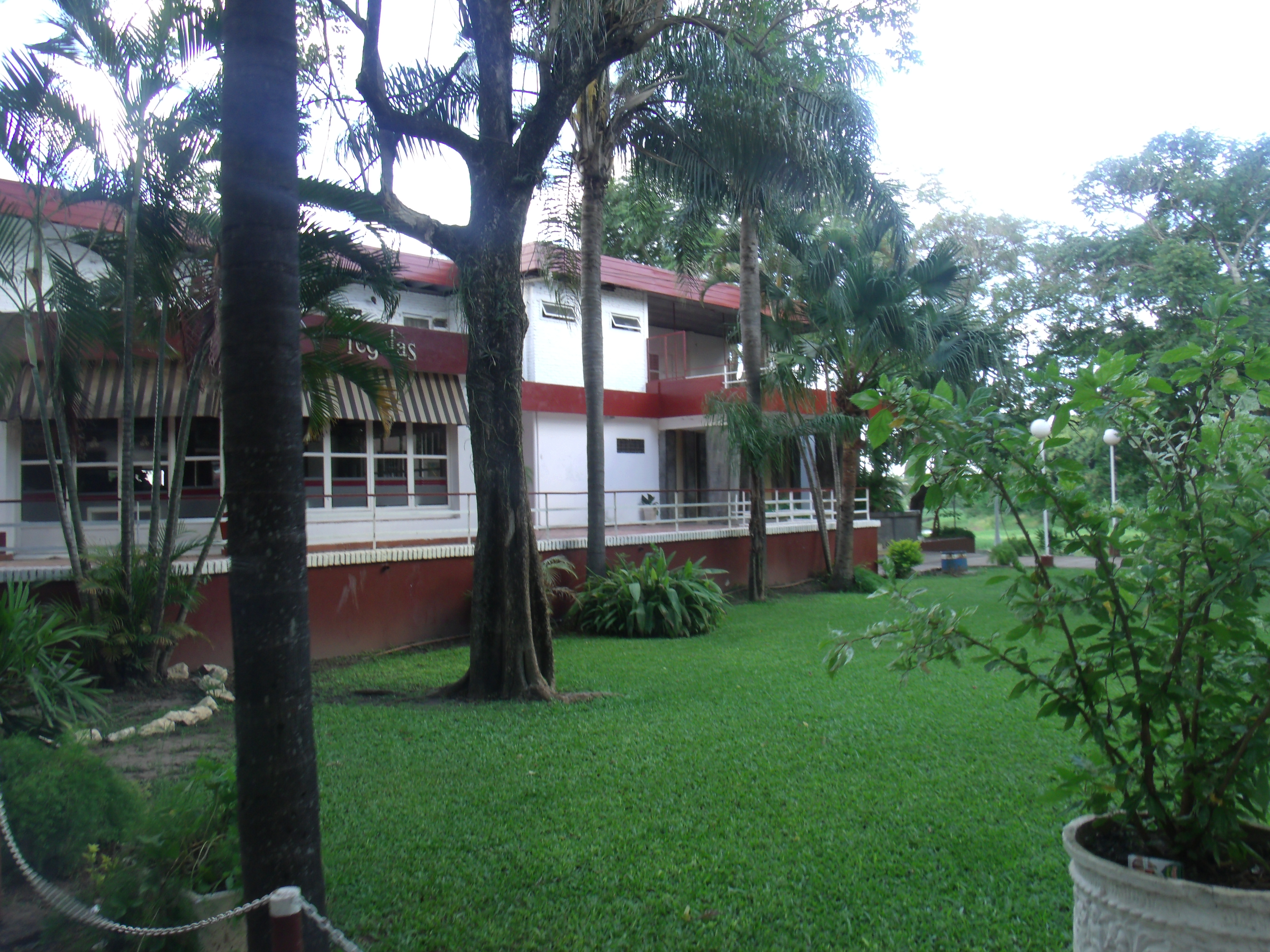 Salón de eventos y jardín en la entrada al Club de Regatas Resistencia